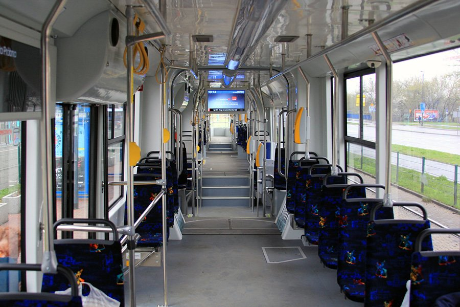 Wnętrze przedziału pasażerskiego.